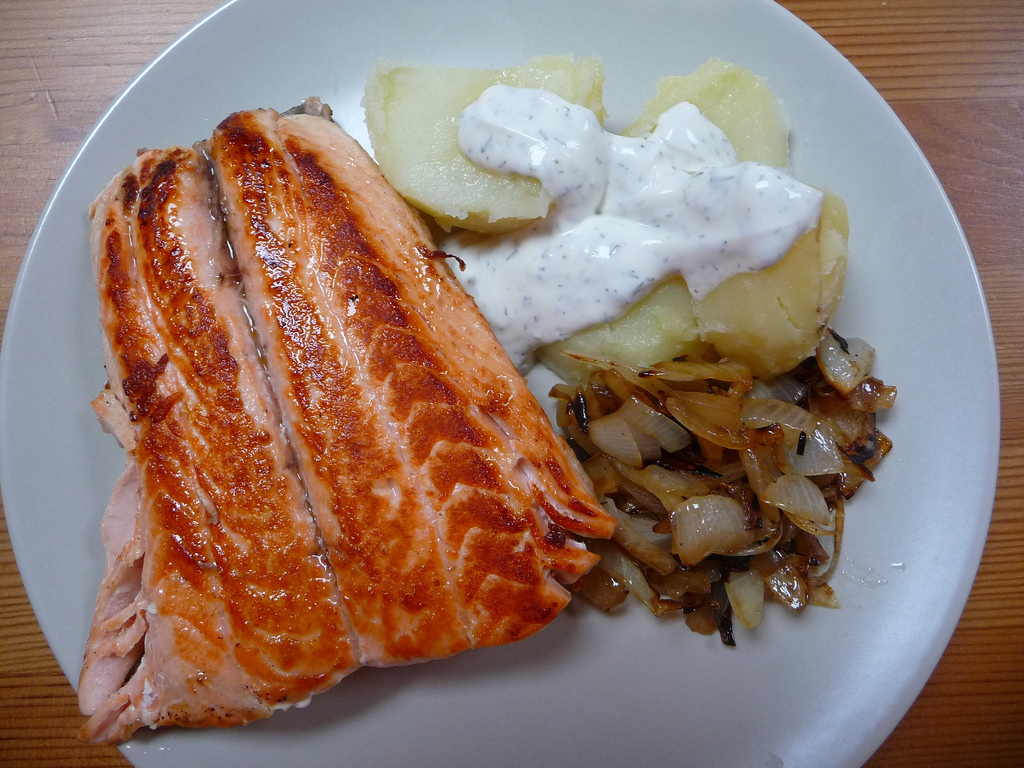 salmón a la plancha.